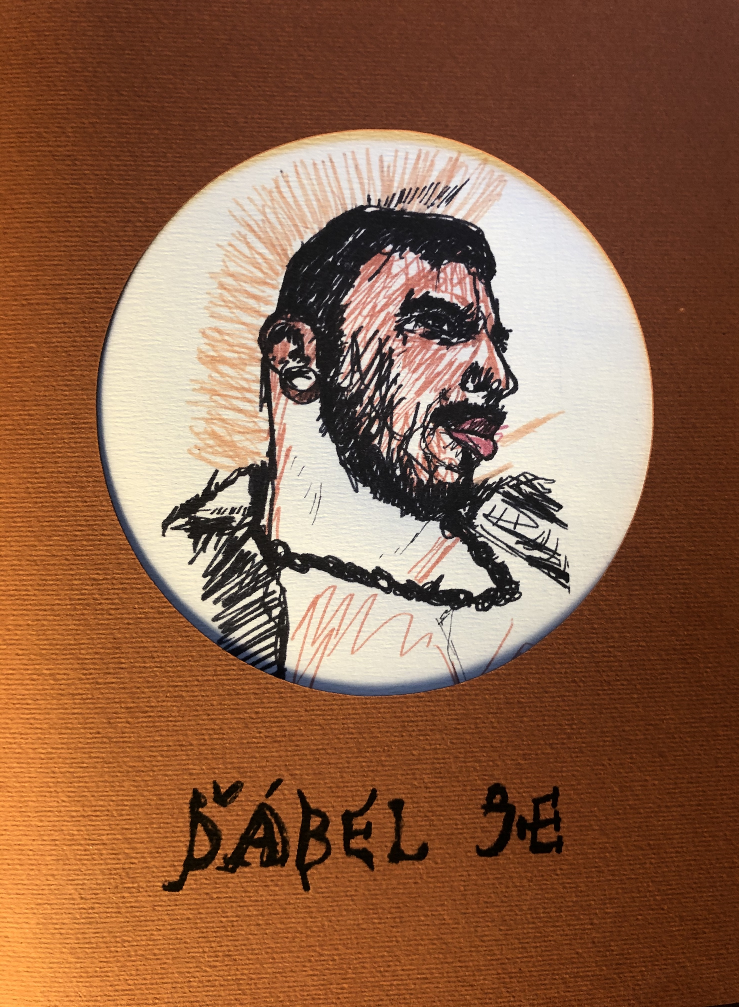 ĎÁBEL JE basnicka sbirka